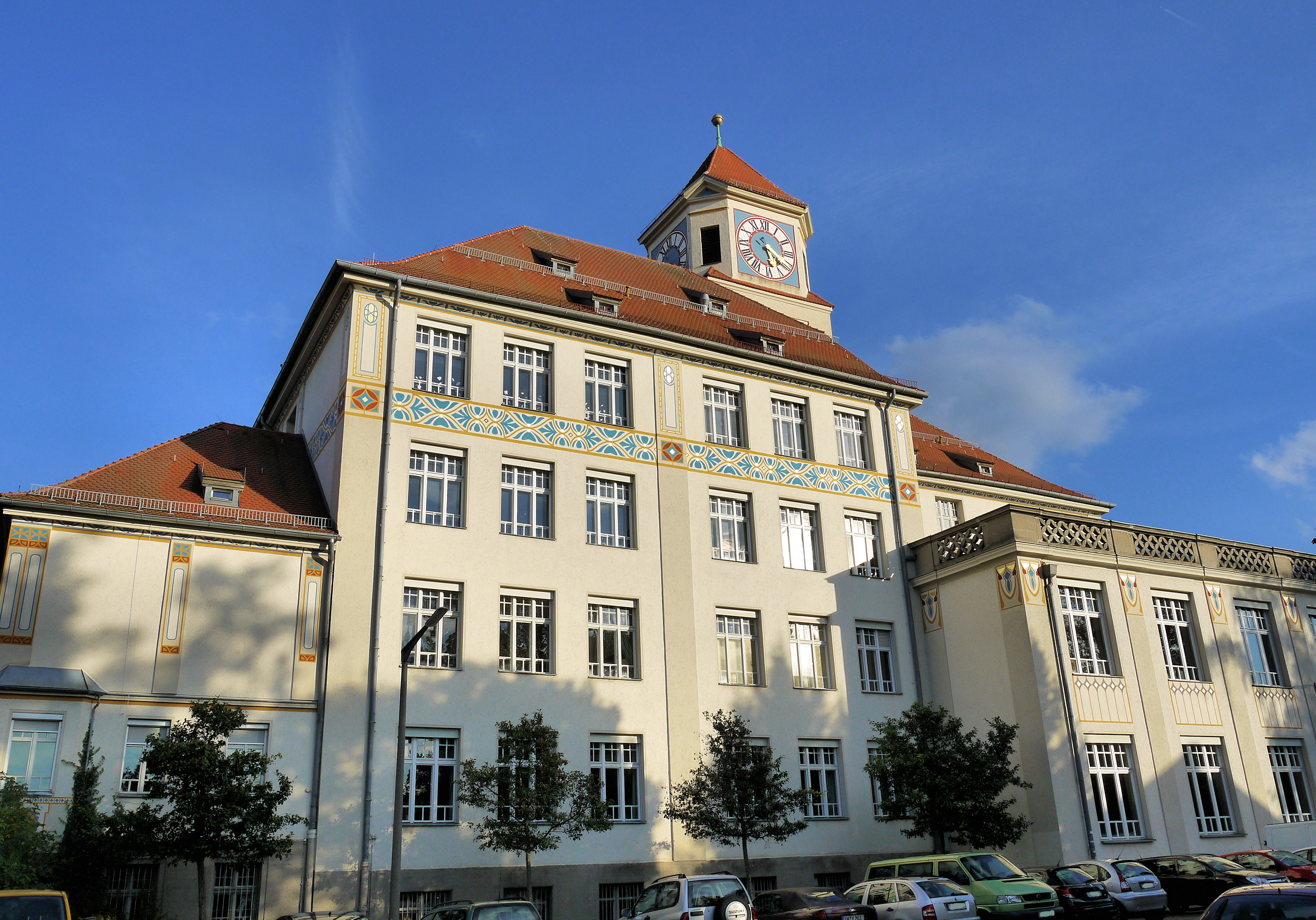 PestalozzischuleThis is a photograph of an architectural monument.